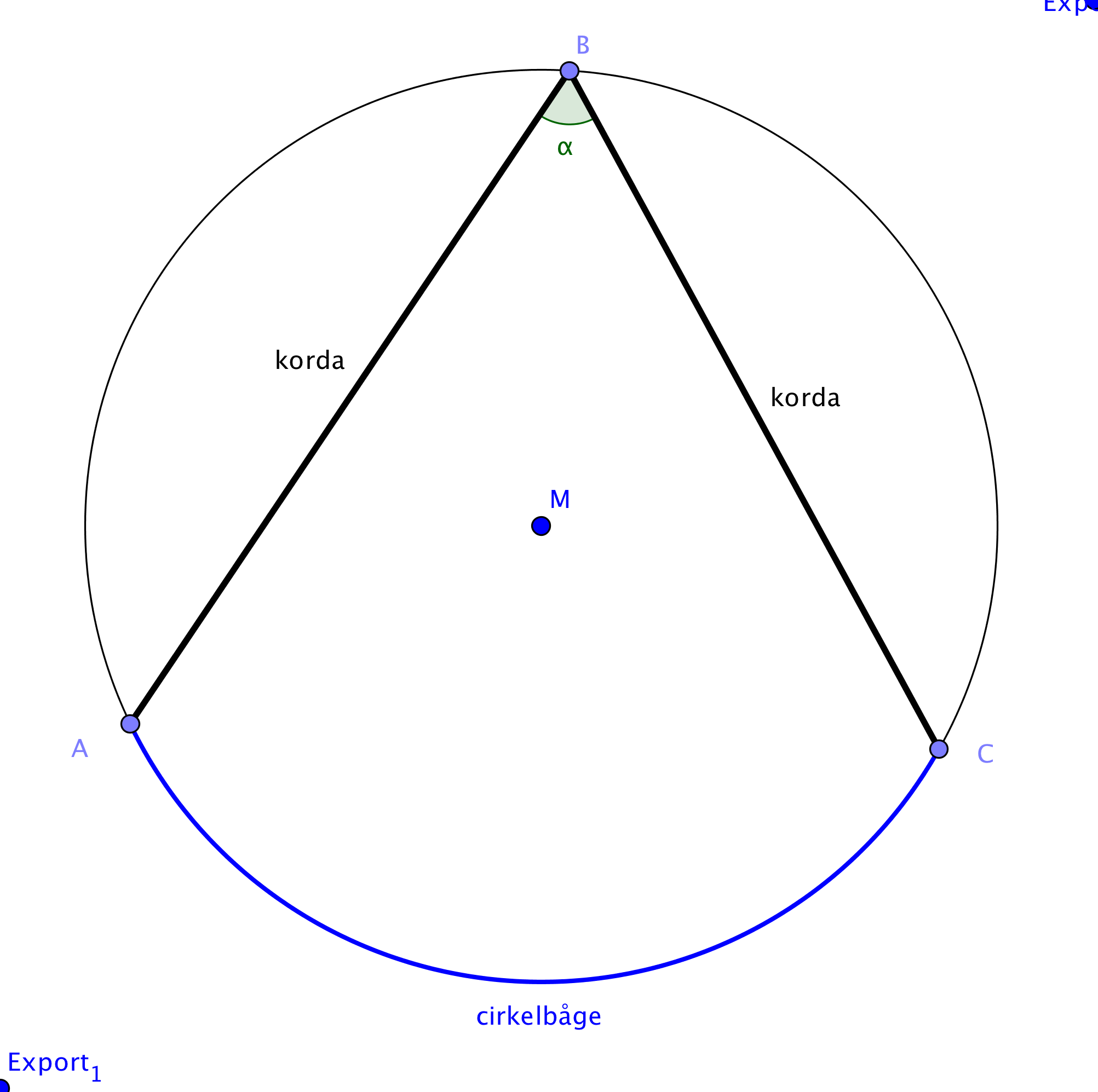 randvinkel bättre upplösning